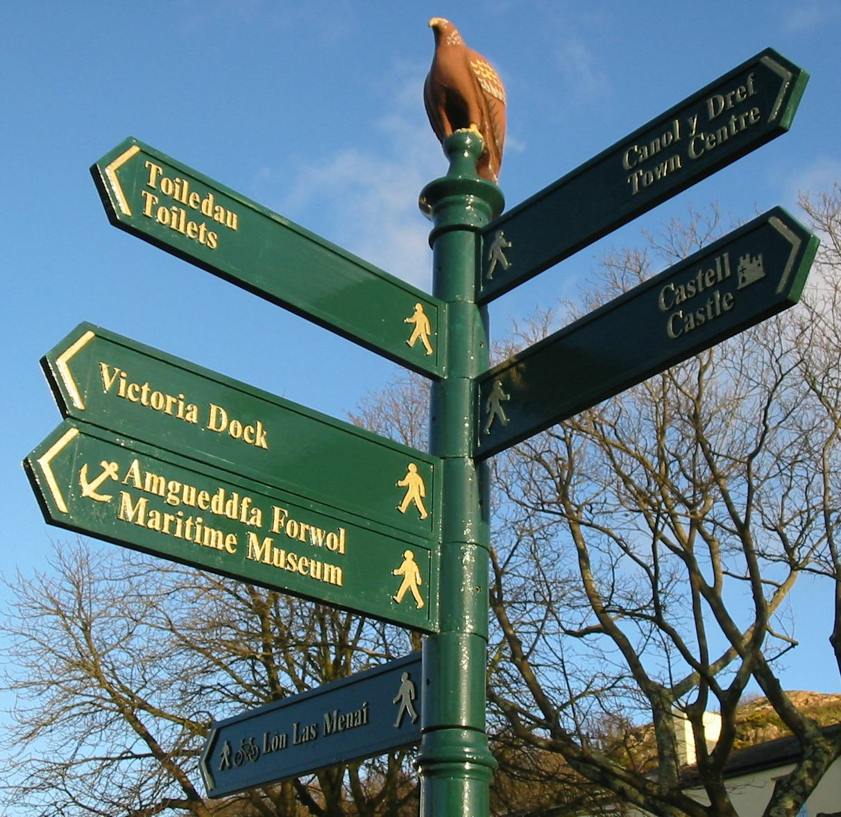 विभिन्न स्थानों को बताता हुआ स्थान निदेशक सूचक.